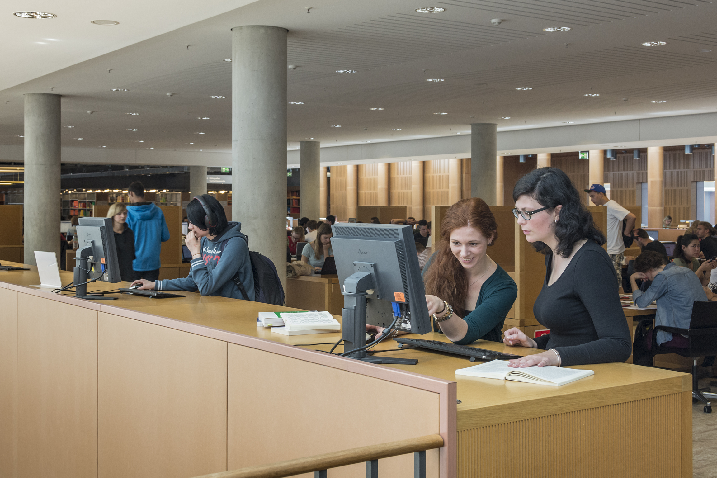 Foto: SLUB Dresden / Henrik Ahlers